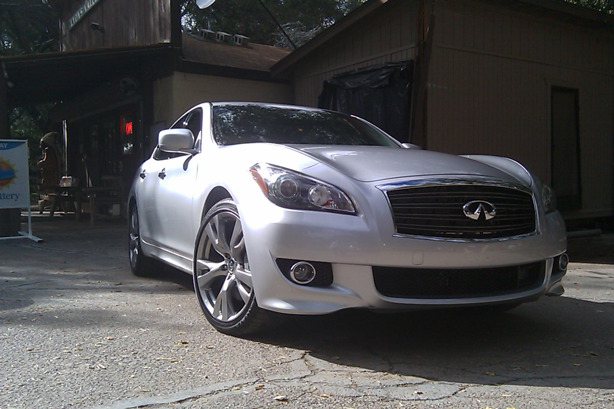 2011 Infiniti M.